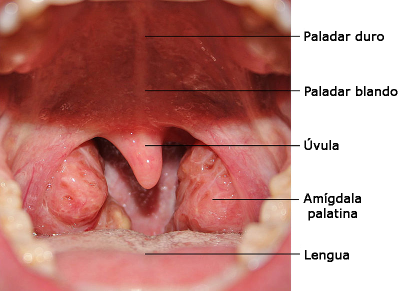 Imagen de la boca en la que es visible el paladar duro, paladar blando, amígdala palatina, lengua y úvula